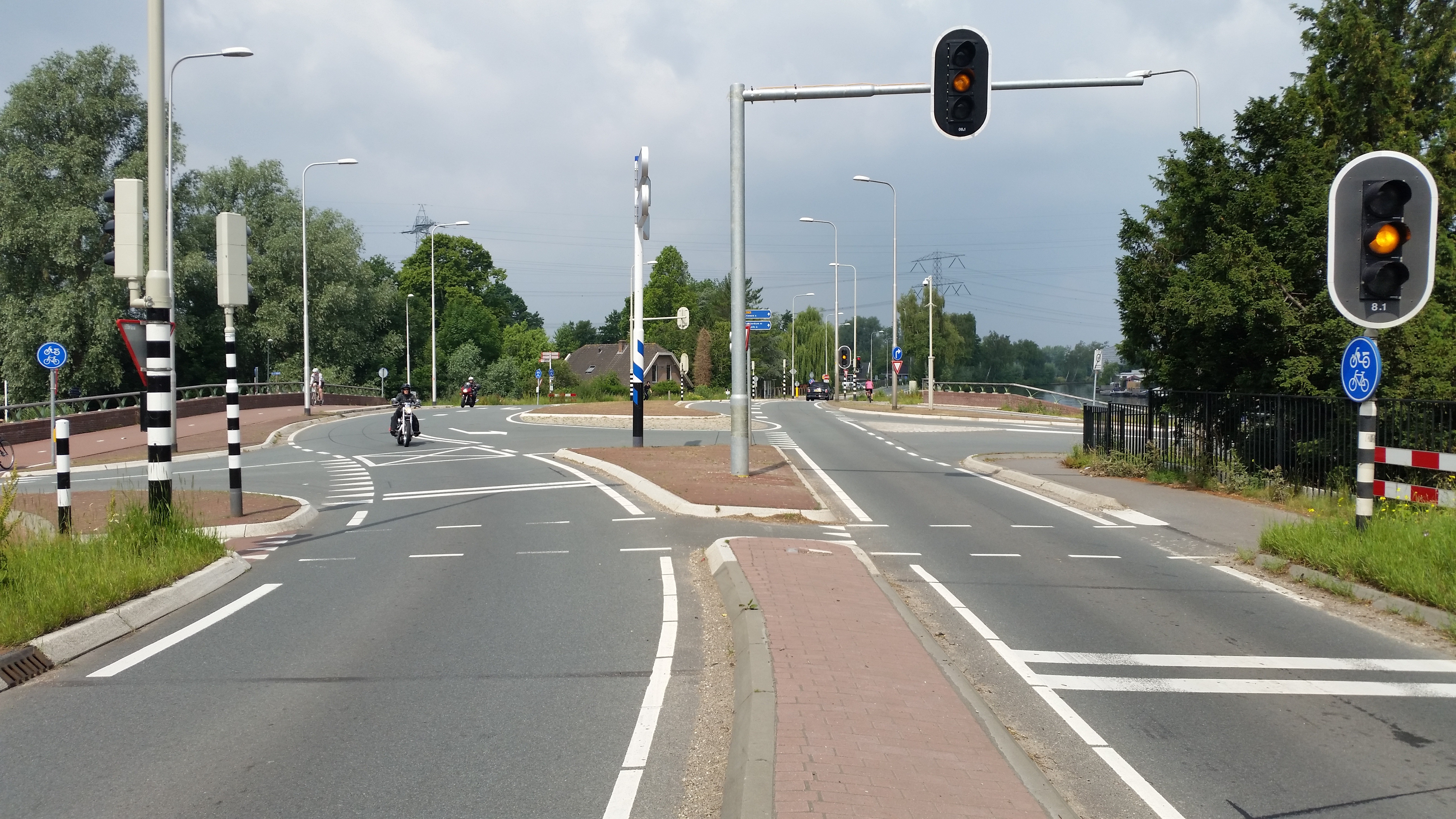 Impressie van de Geinboogbrug (juni 2020)